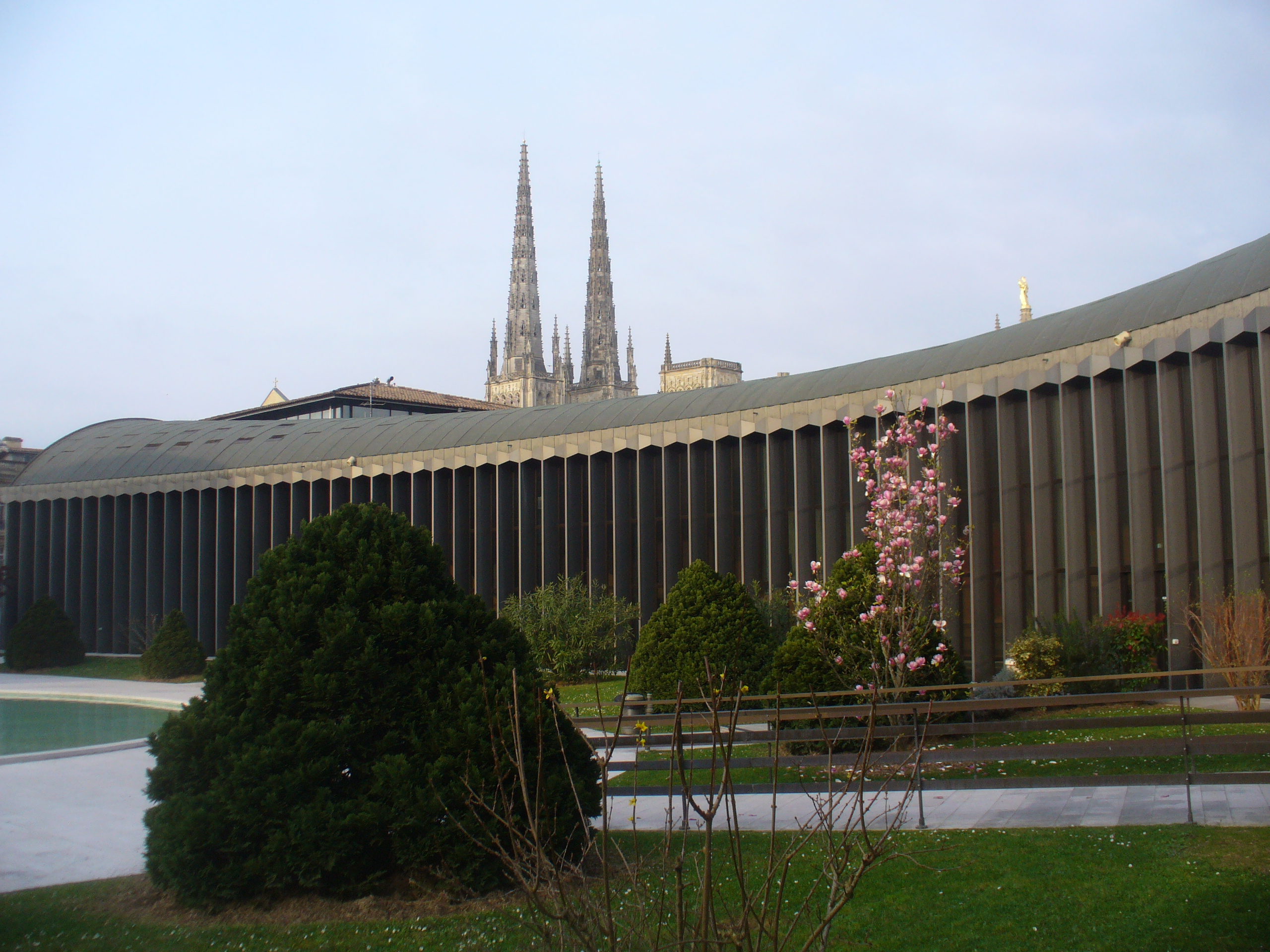 Jardin et bassin